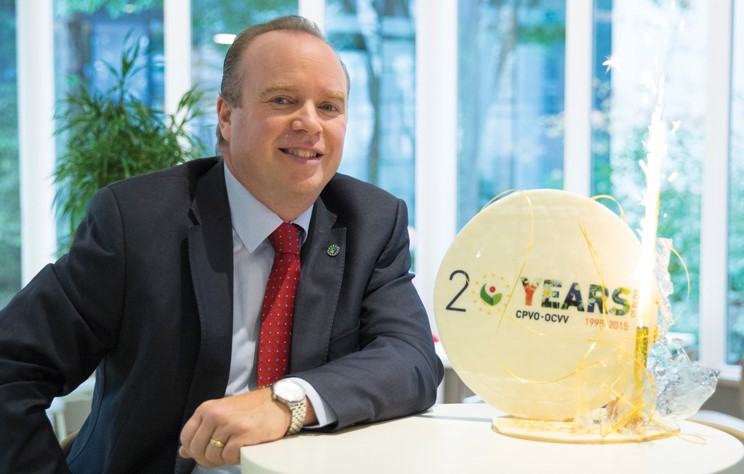 Martin Ekvad, president de l'OCVV